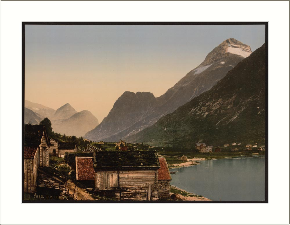 Olden Nordfjord Norway